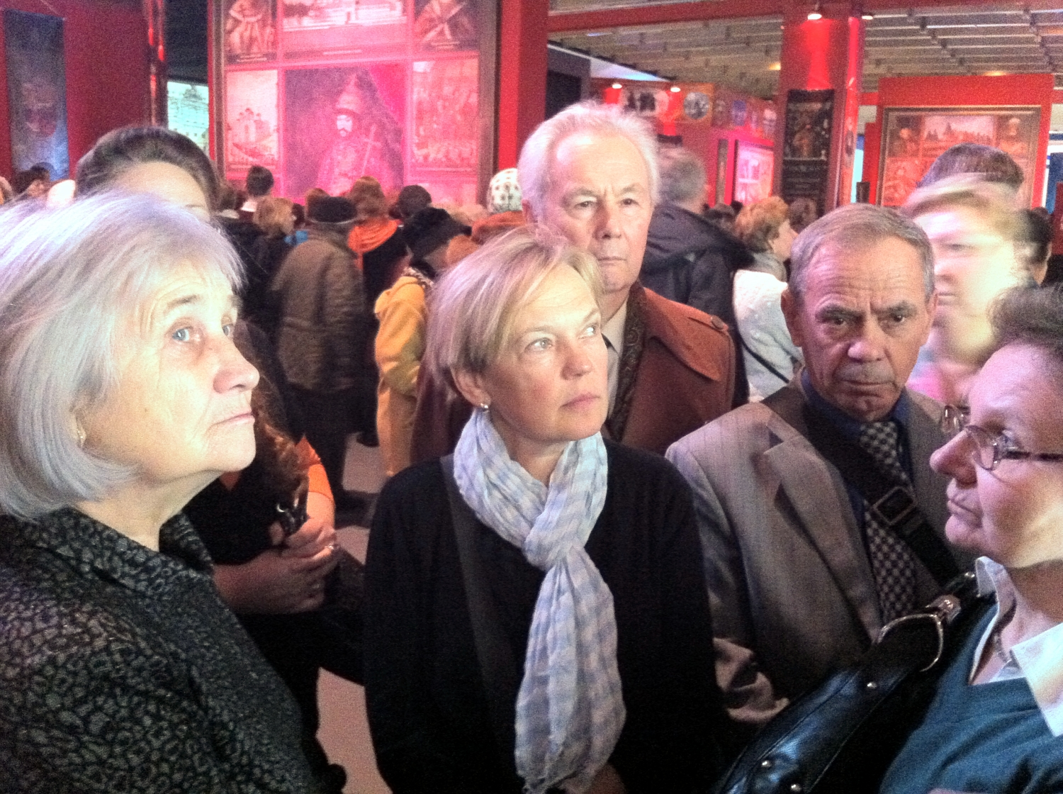 Тамара Андреевна Афанасьева, Елена Леонидовна Минина и другие сотрудники Геологического музея им. В. И. Вернадского РАН на выставке в Манеже, 2013.